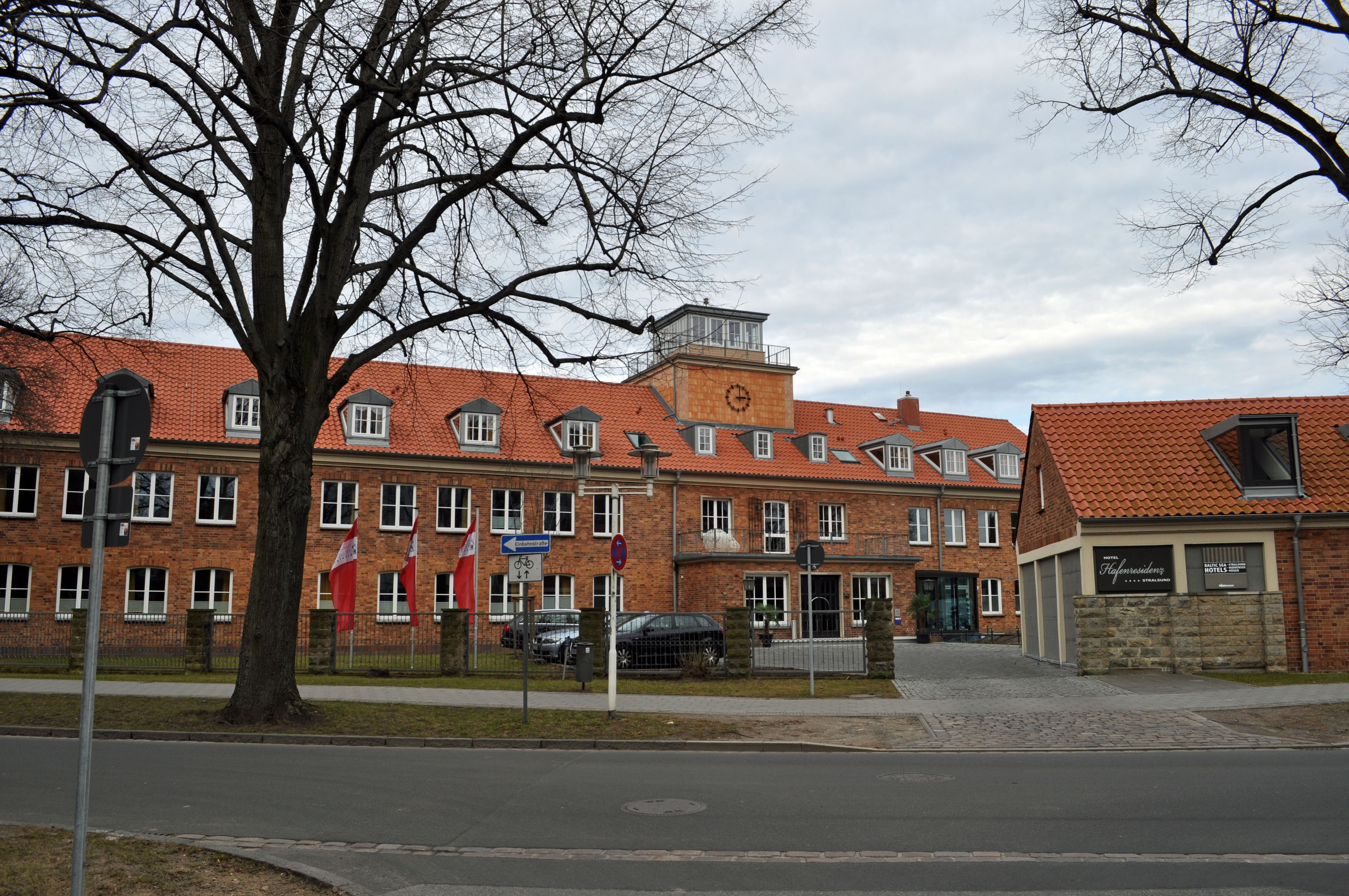 Gebäude bzw. Gebäudedetail in Stralsund. Straße und Hausnummer siehe Dateiname.